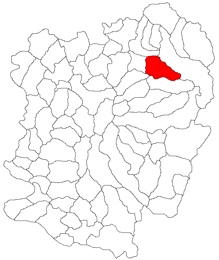 Categorie:Hărţi ale judeţului Caraş-Severin